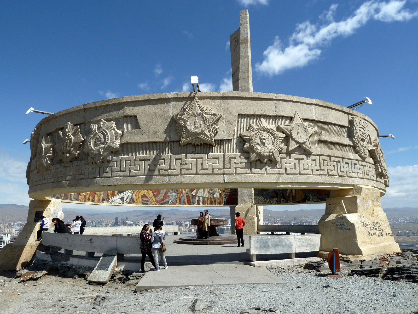 Khoroo 11, Ulaanbaatar, Mongolia